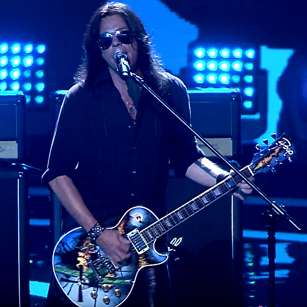 Wojciech Łuczaj-Pogorzelski z zespołu muzycznego "Oddział Zamknięty".